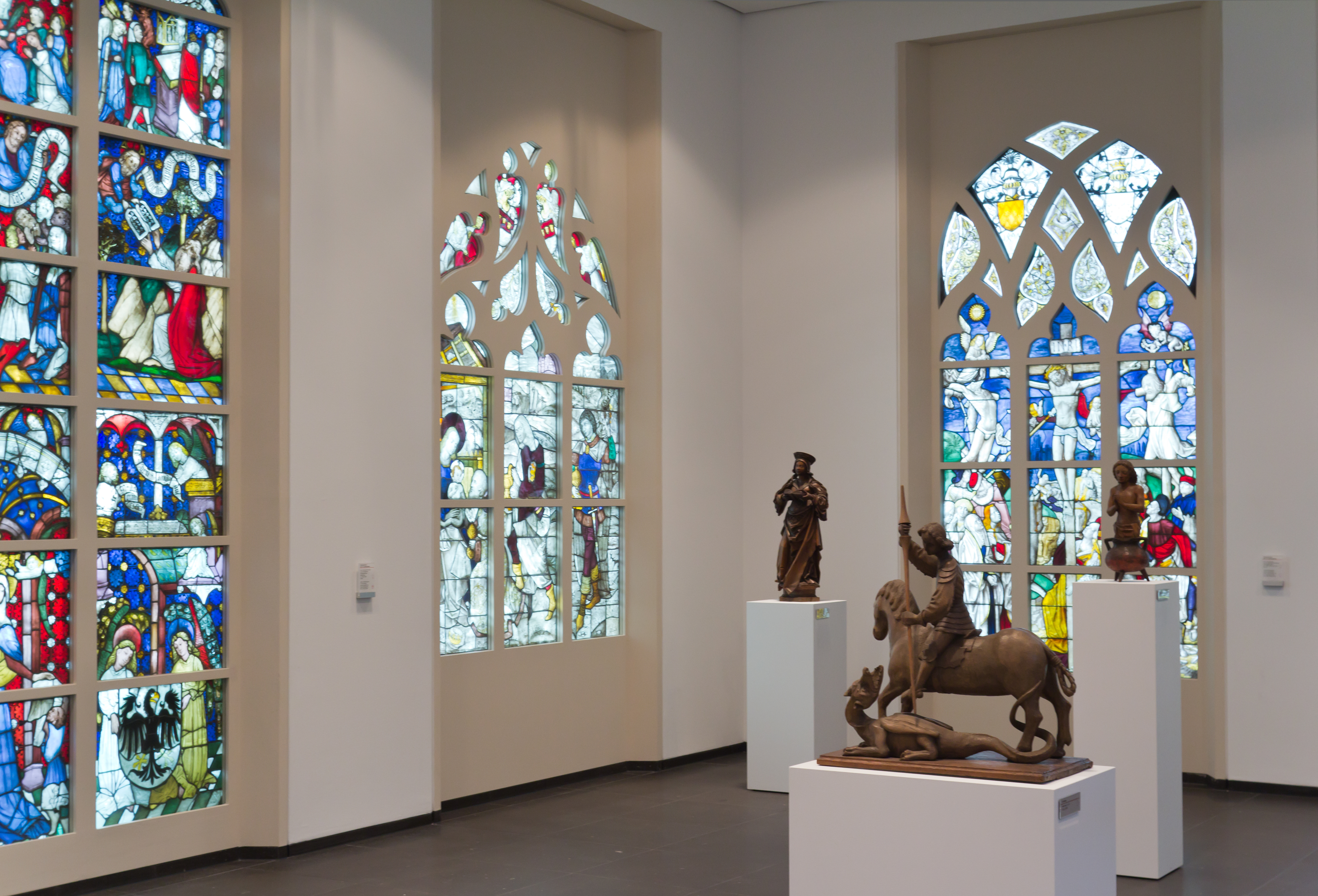 Große Ausstellungshalle Museum Schnütgen, Glasfenster und Skulpturen